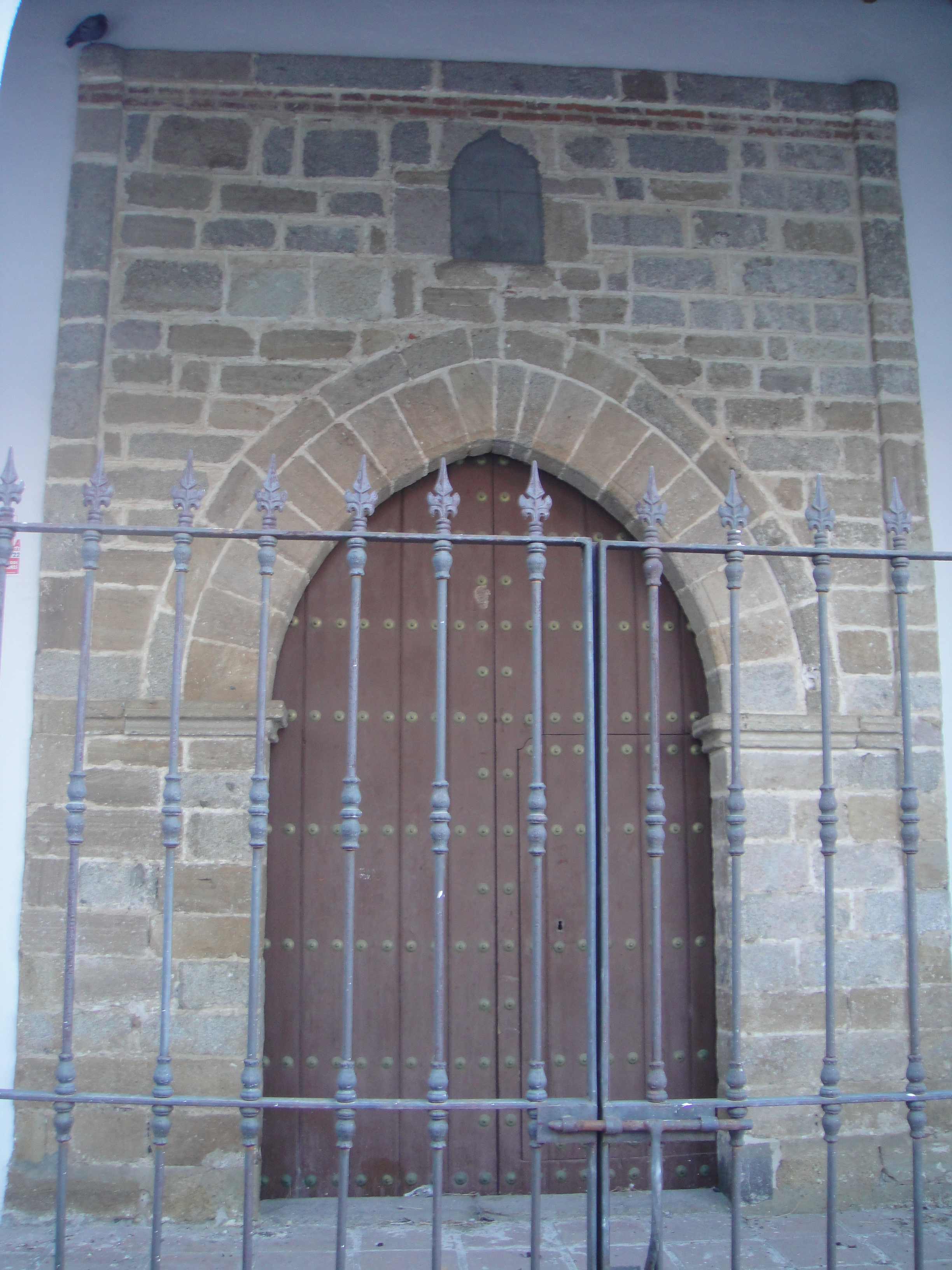 Portada del lado del Evangelio de la iglesia de Nuestra Señora del Castillo de Fuente Obejuna, provincia de Córdoba, (España).